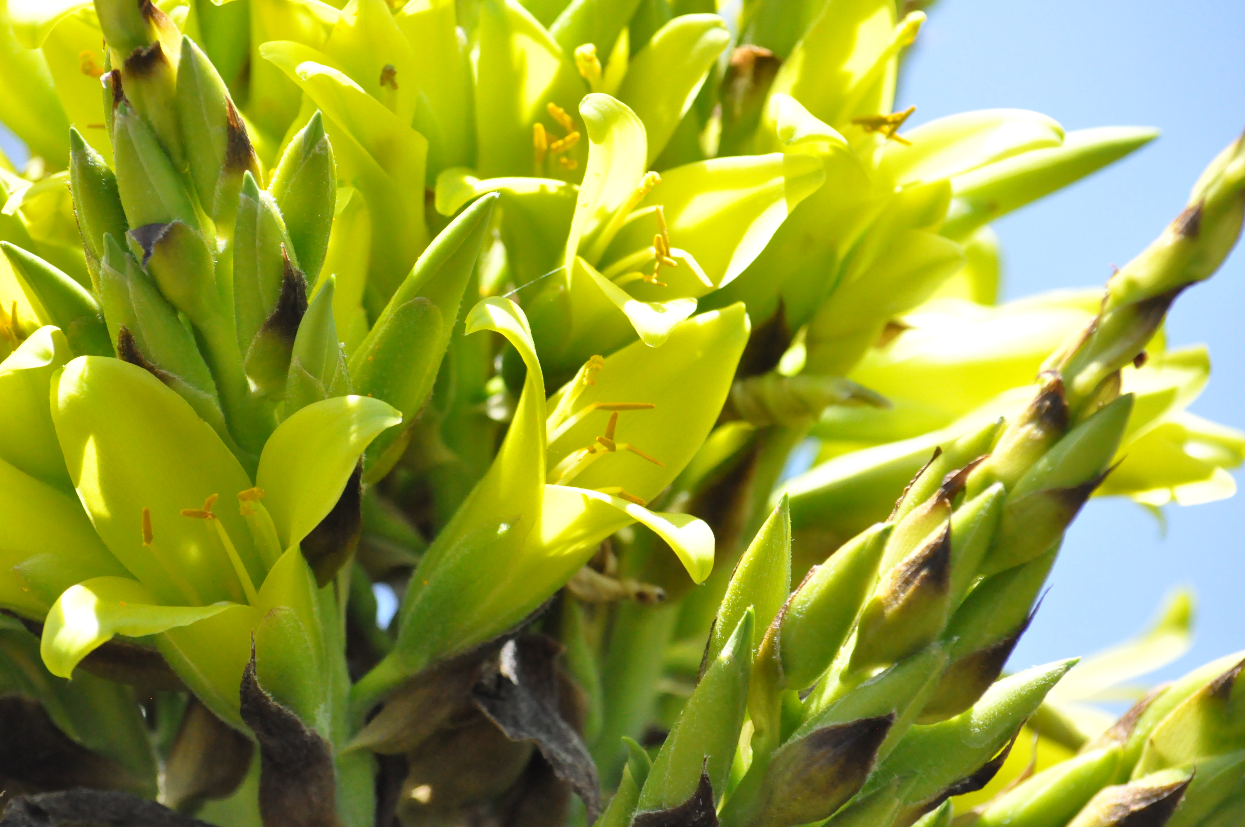 Puya chilensis, ejemplares del Cerro La Cruz en Zapallar, Chile